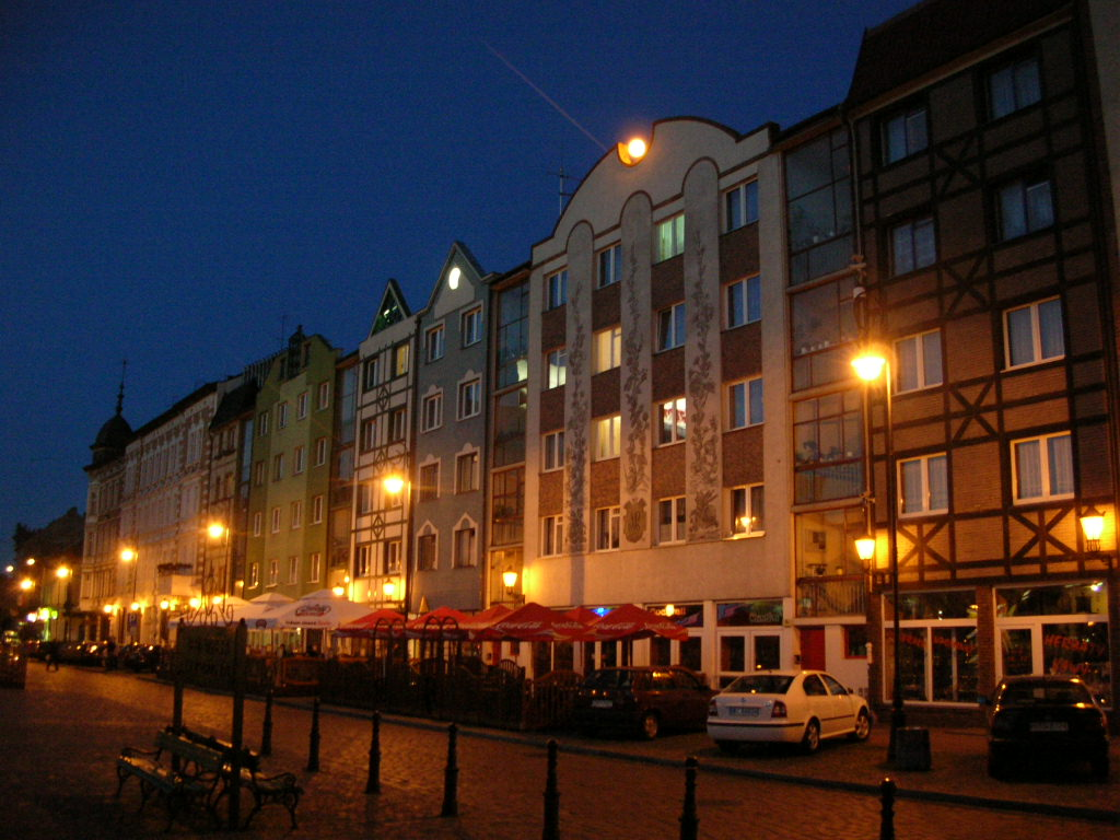 Gorzów - Stary Rynek nocą Autor : Bartek Wawraszko